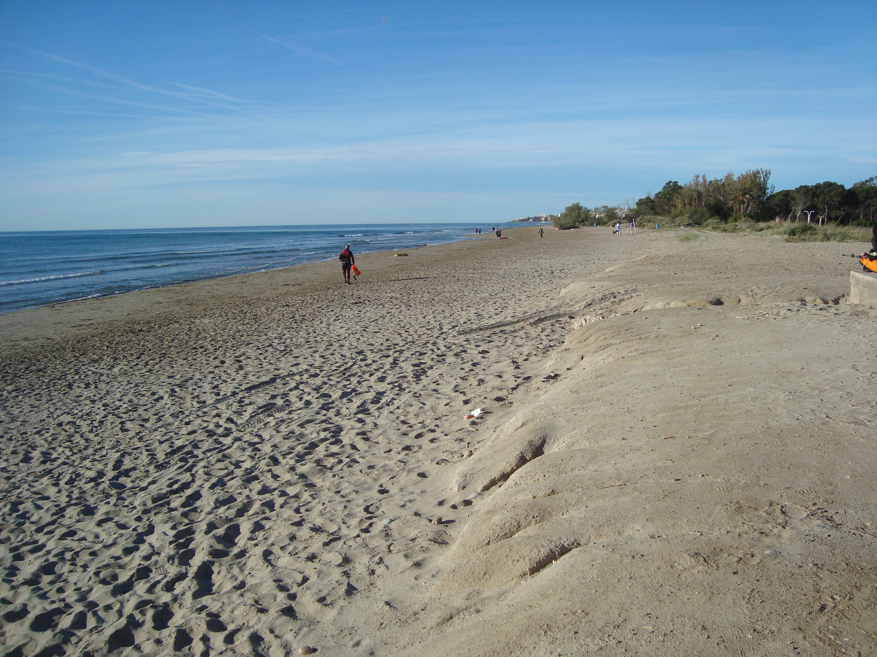 Platja de Torrelasal, Cabanes, Castelló